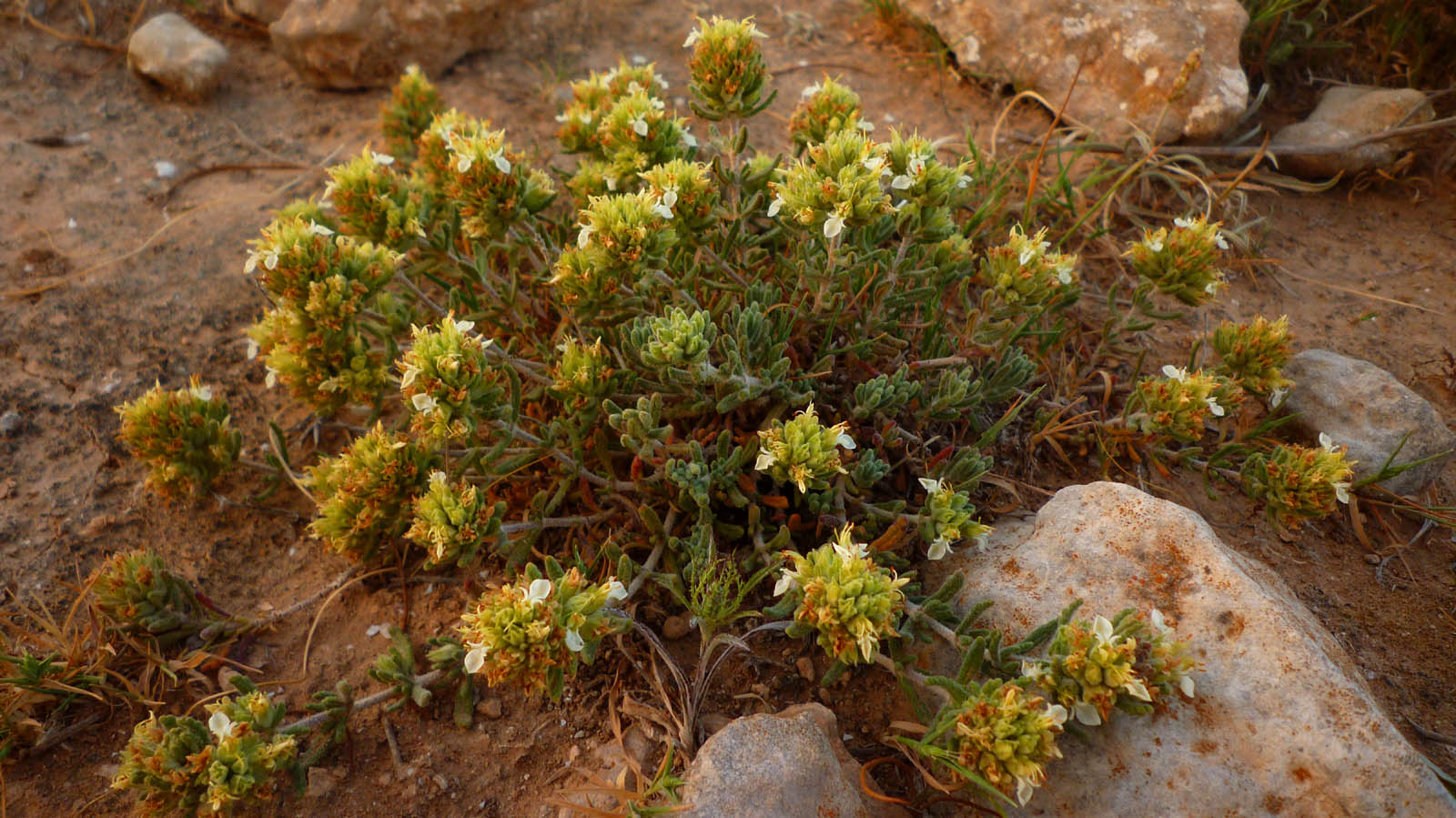 Teucrium carthaginense en el Parque Natural de Calblanque (Cartagena, España).